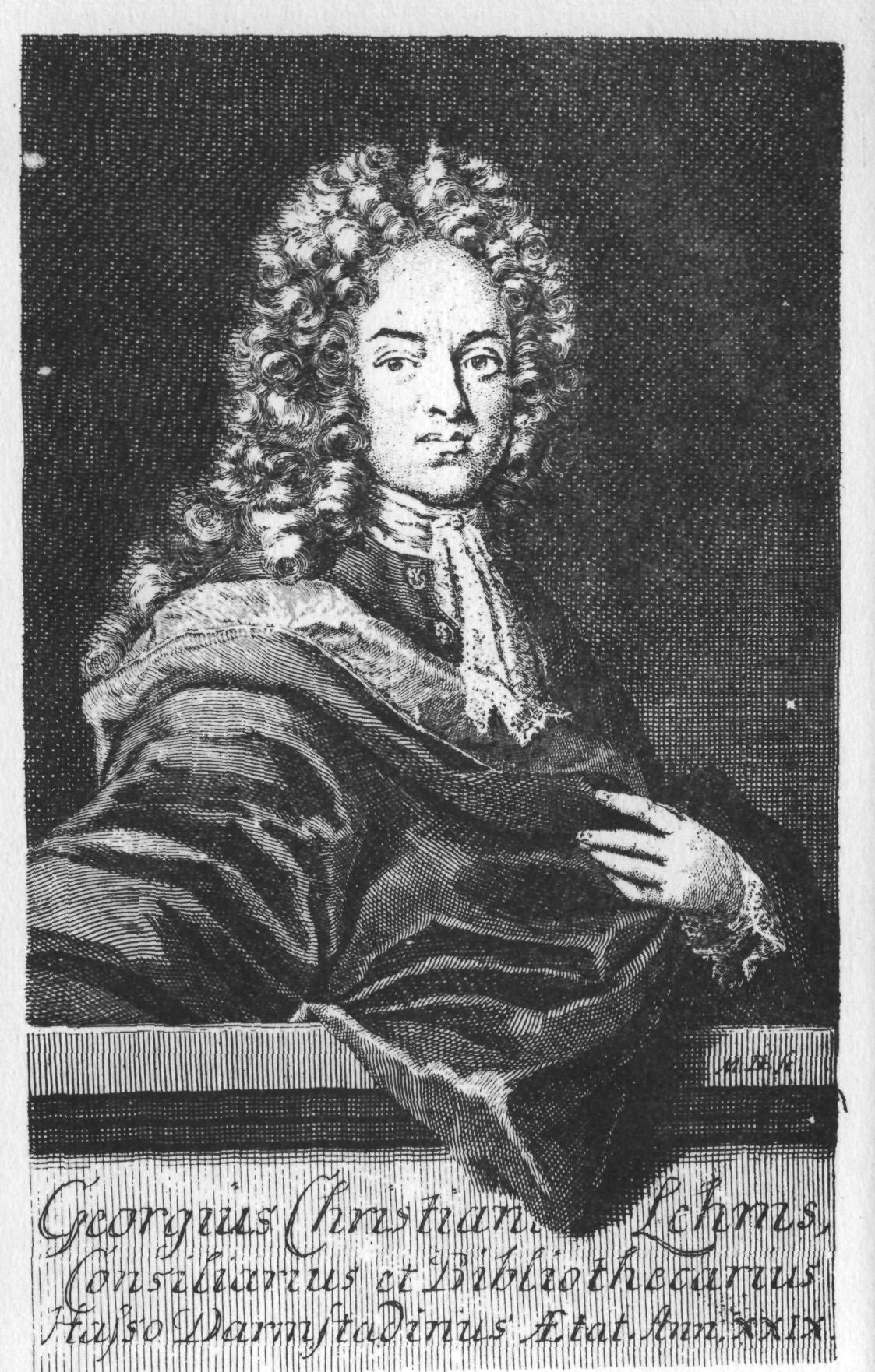 de: Dies ist ein Scan des Buches: en: This is a scan of the book: Teutschlands Galante Poetinnen Mit Ihren sinnreichen und netten Proben; Nebst einem Anhang Ausländischer Dames / So sich gleichfalls durch Schöne Poesien Bey der curieusen Welt bekannt gemacht, und einer Vorrede. Daß das Weibliche Geschlecht so geschickt zum Studieren / als das Männliche / ausgefertiget Von Georg Christian Lehms., Franckfurt am Mayn / Zu finden bey Samuel Tobias Hocker. Gedruckt bey Anton Heinscheidt / Anno 1715. Inhalt: Titel / Widmung Vorrede Teutschlands Galante Poetinnen Anhang Ausländischer Poetinnen